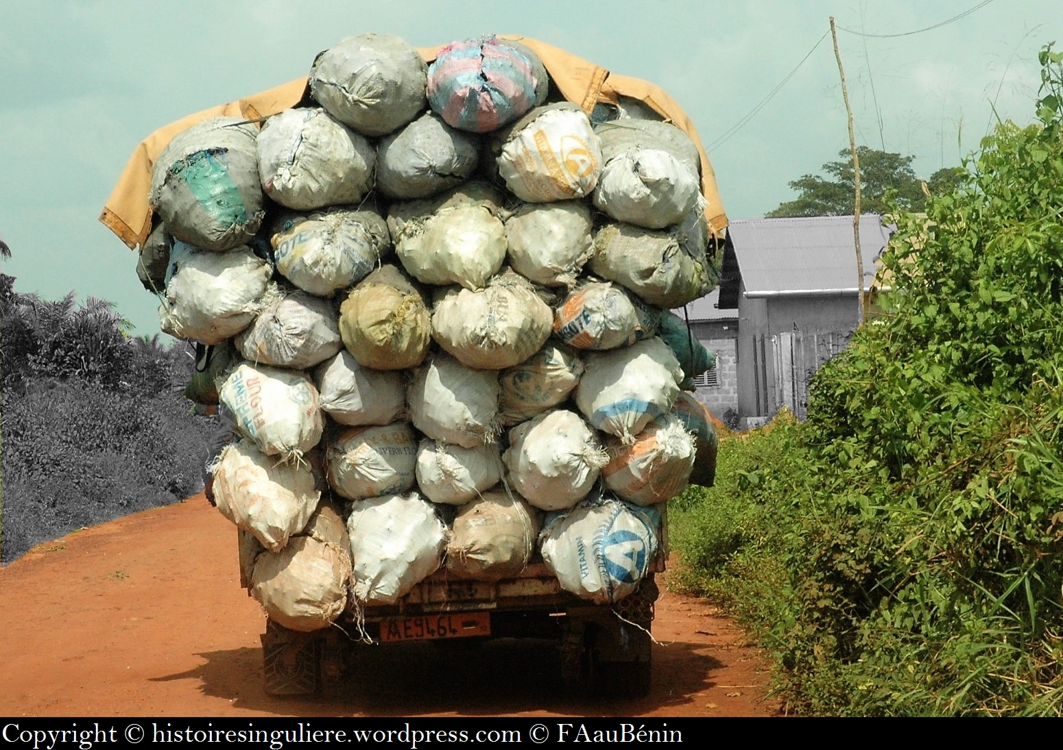 Le coton se transporte This is an image of "African people at work" from Benin